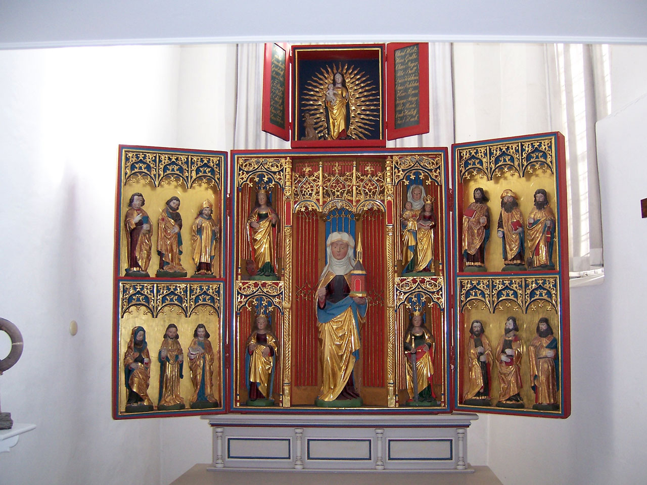 Stade, Kirche St. Cosmae (13.Jh), St. Gertruden-Altar (um 1500), aus der 1834 abgebrochenen Kirche St. Nicolai